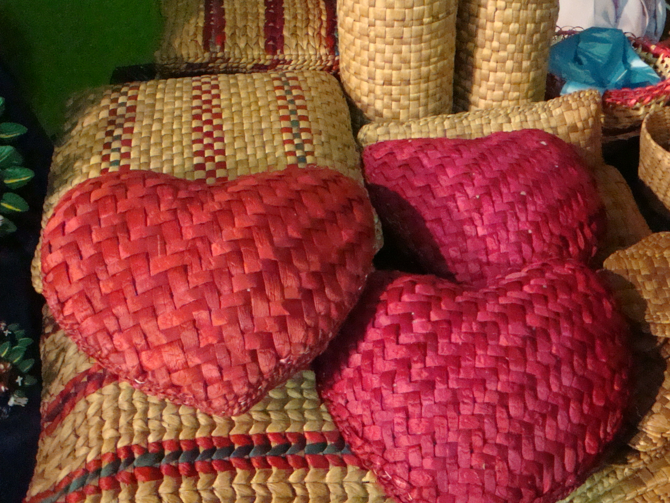 Cojines de fibra de jacinto. Artesanía típica del municipio de Nacajuca, Tabasco, México